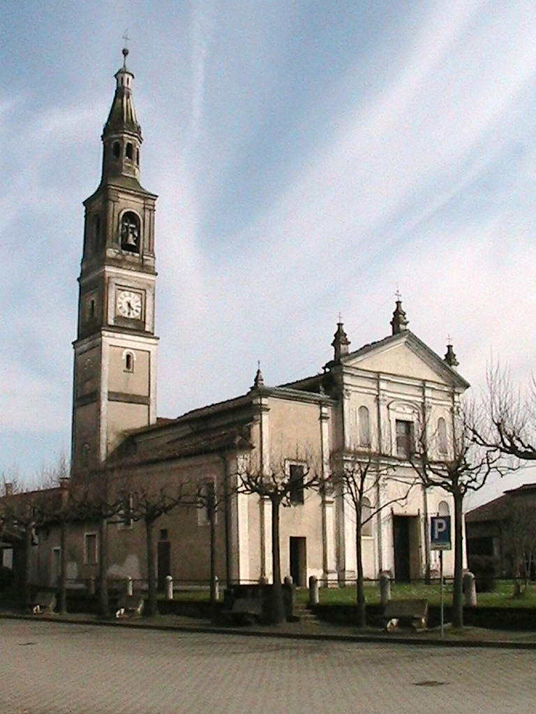 Derovere - La chiesa parrocchiale di San Giorgio